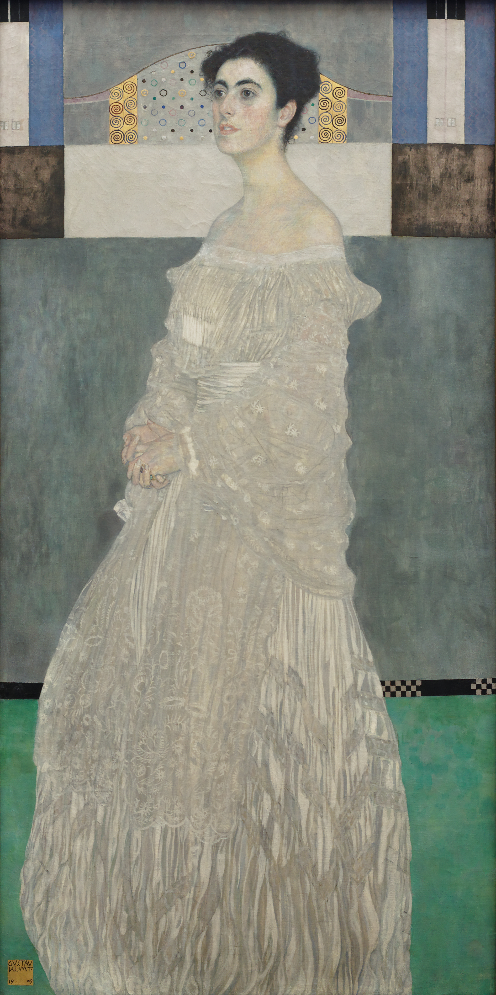 label QS:Lde,"Porträt der Margaret Stonborough-Wittgenstein" label QS:Lfr,"Portrait de Margaret Stonborough-Wittgenstein"